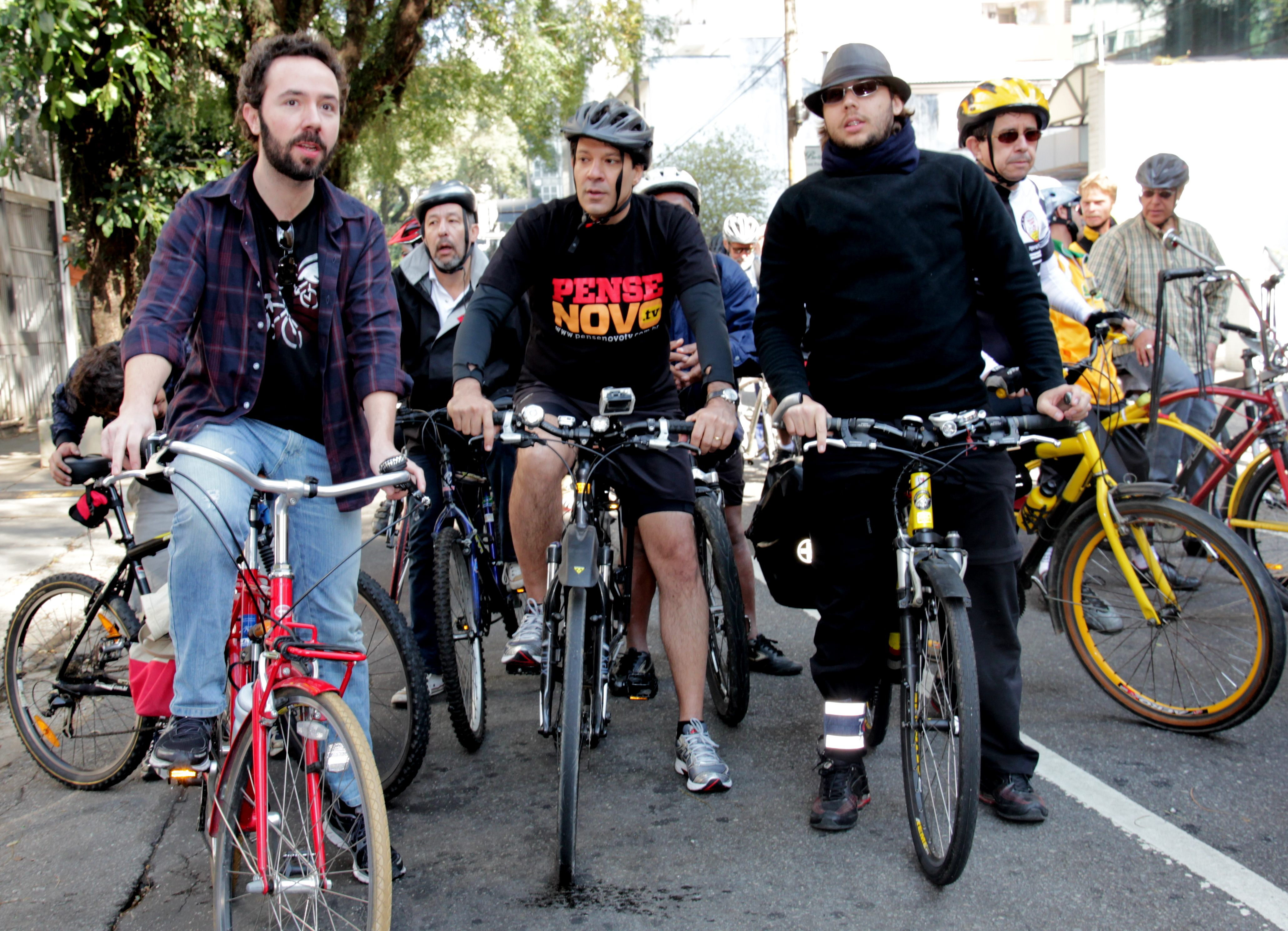 Thiago Benicchio do CicloCidade, Felipe Aragonez do CicloBR e Fernando Haddad pedalando em São Paulo